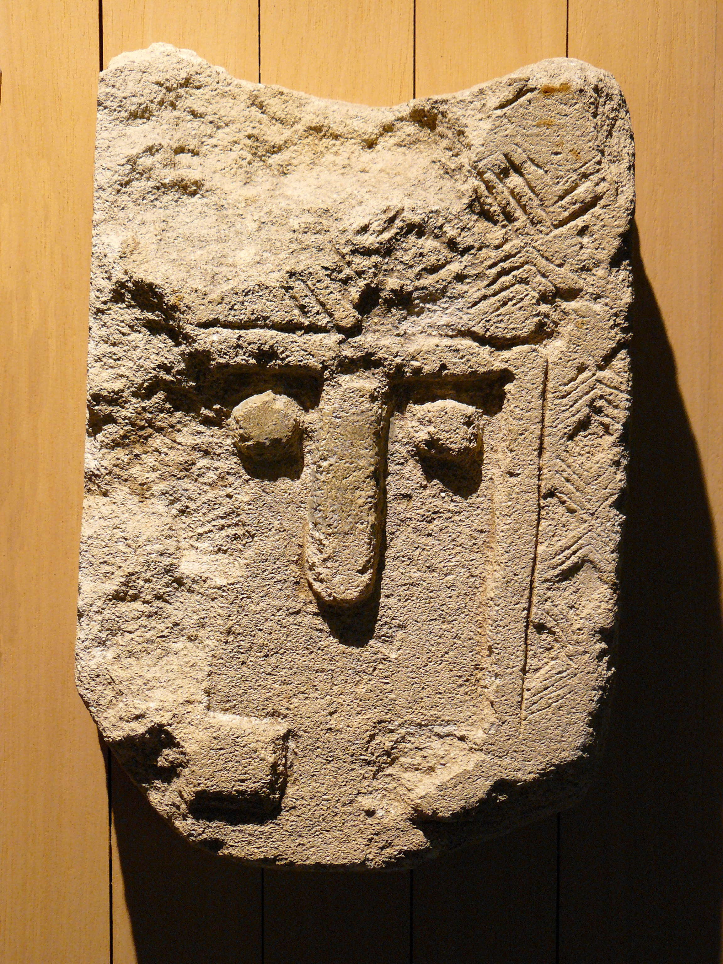 Stèle provençale quadrangulaire en calcaire - Cavaillon (Vaucluse), découverte fortuitement. (vers le IVe millénaire av.JC.), hauteur environ 60 cm - Musée d"archéologie nationale de Saint-Germain-en-Laye.